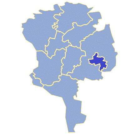 Powiat żarski - miasto Żary